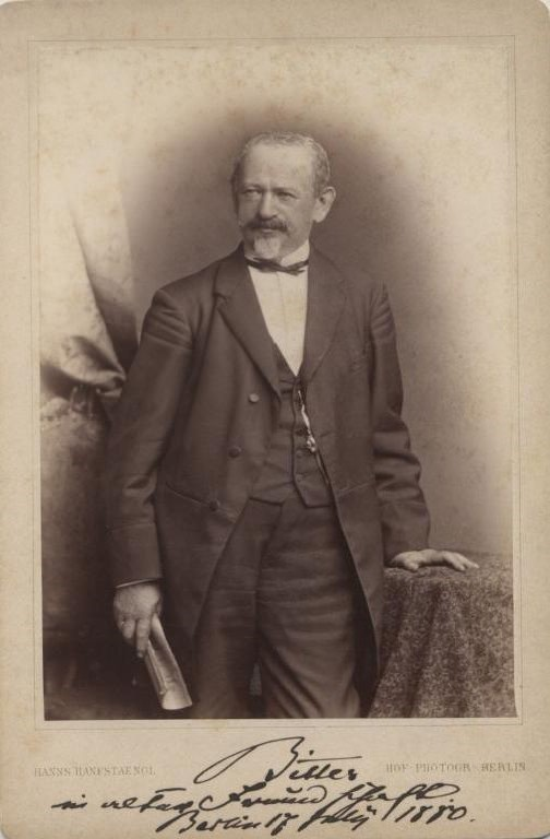 Karl Hermann Bitter